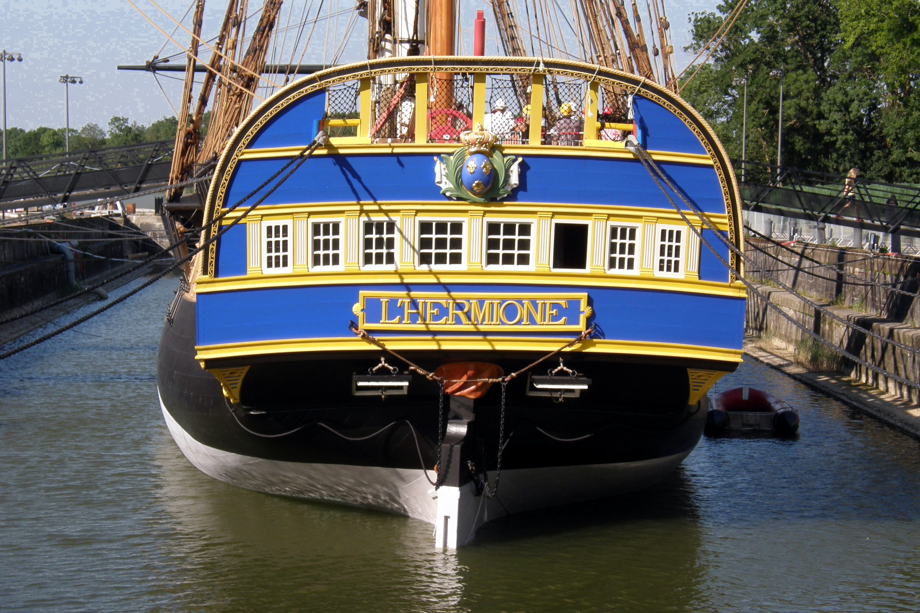 Reconstitution de la Frégate Hermione, au port de Rochefort sur Mer (France). Vue de la poupe.